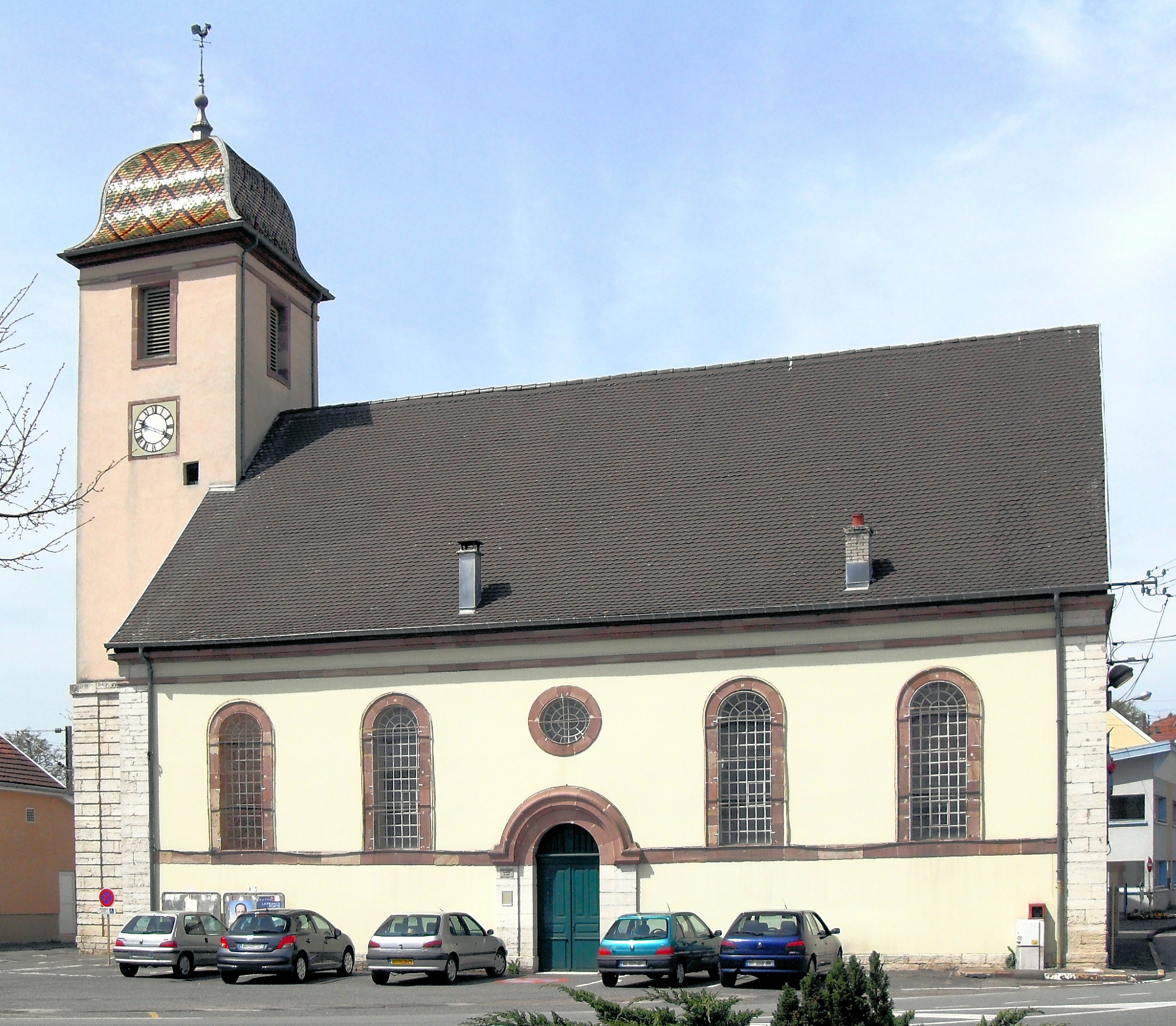 Le temple protestant à Bethoncourt